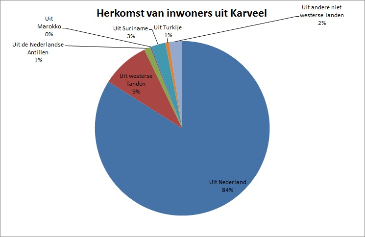 Informatie van: (B09)